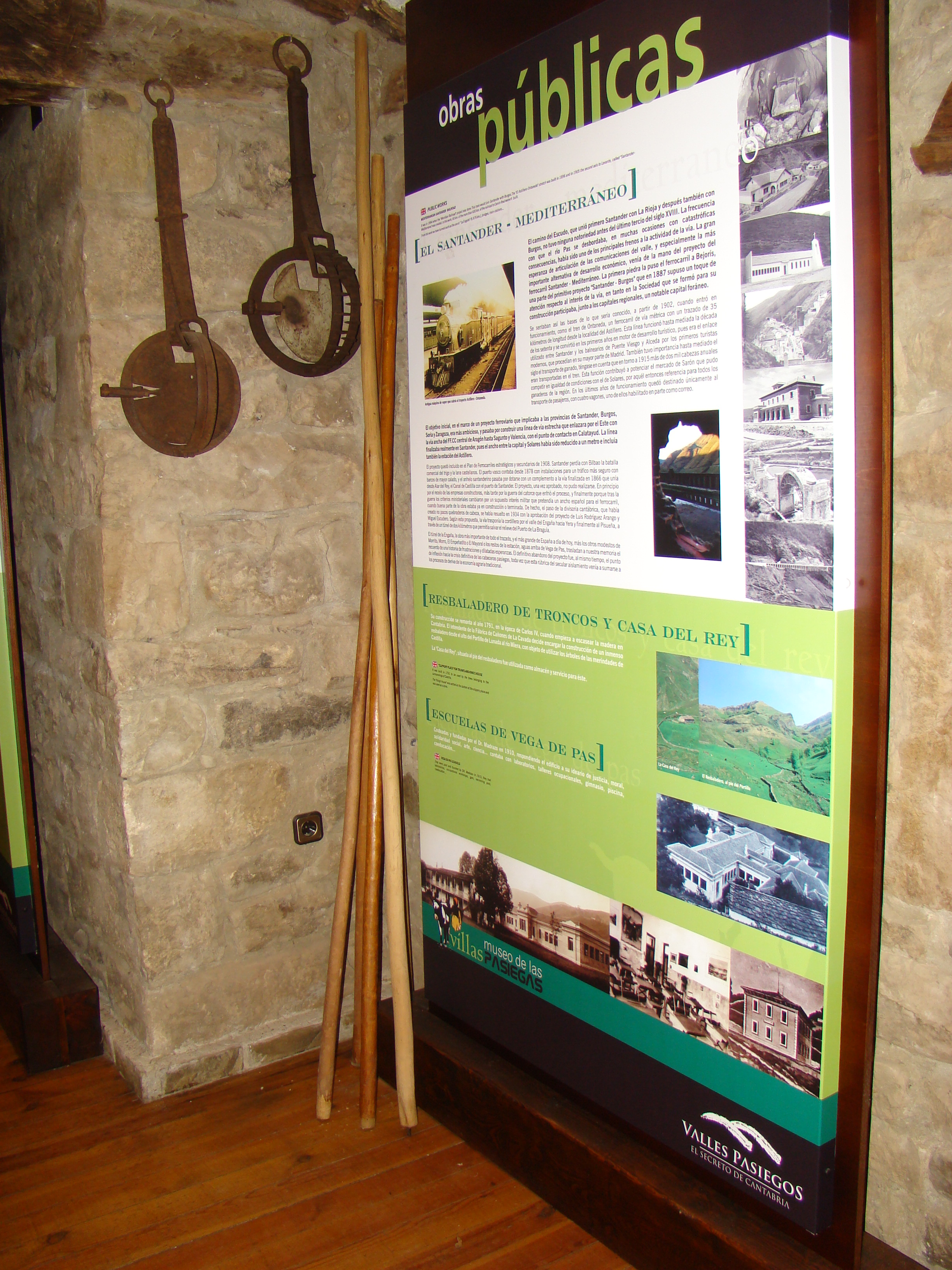 Vega de Pas en Cantabria, España. Museo de las Villas Pasiegas. En el rincón, palos pasiegos para saltar.